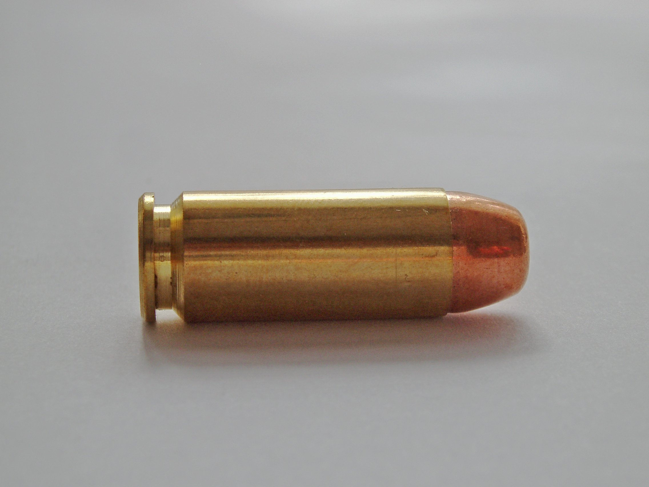 10MM AUTO pistol cartrdige. FMJ bullet.